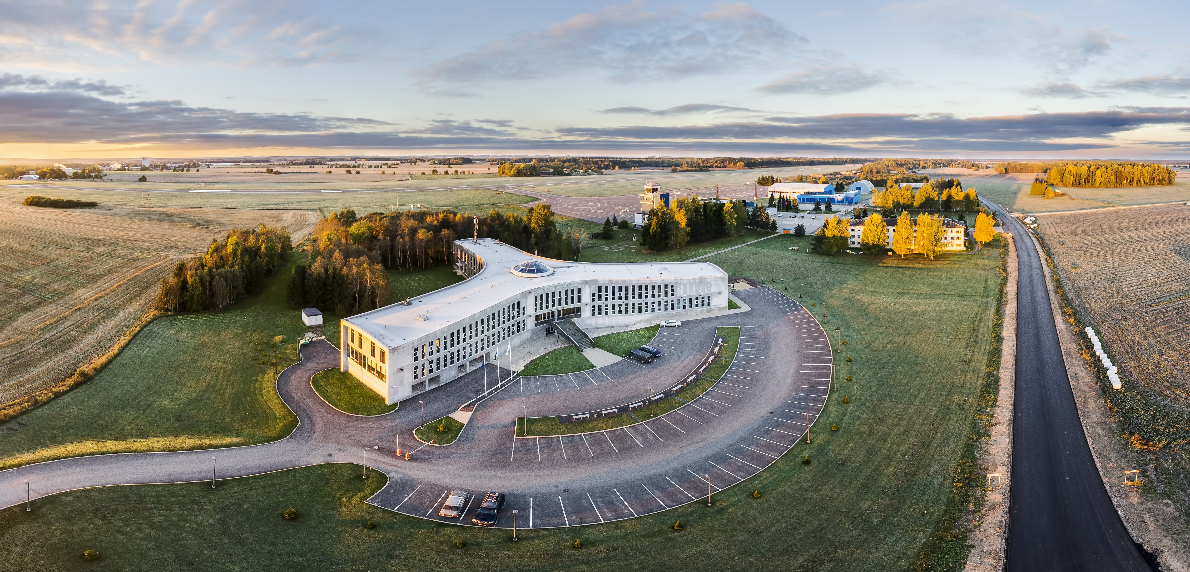 Eesti Lennuakadeemia